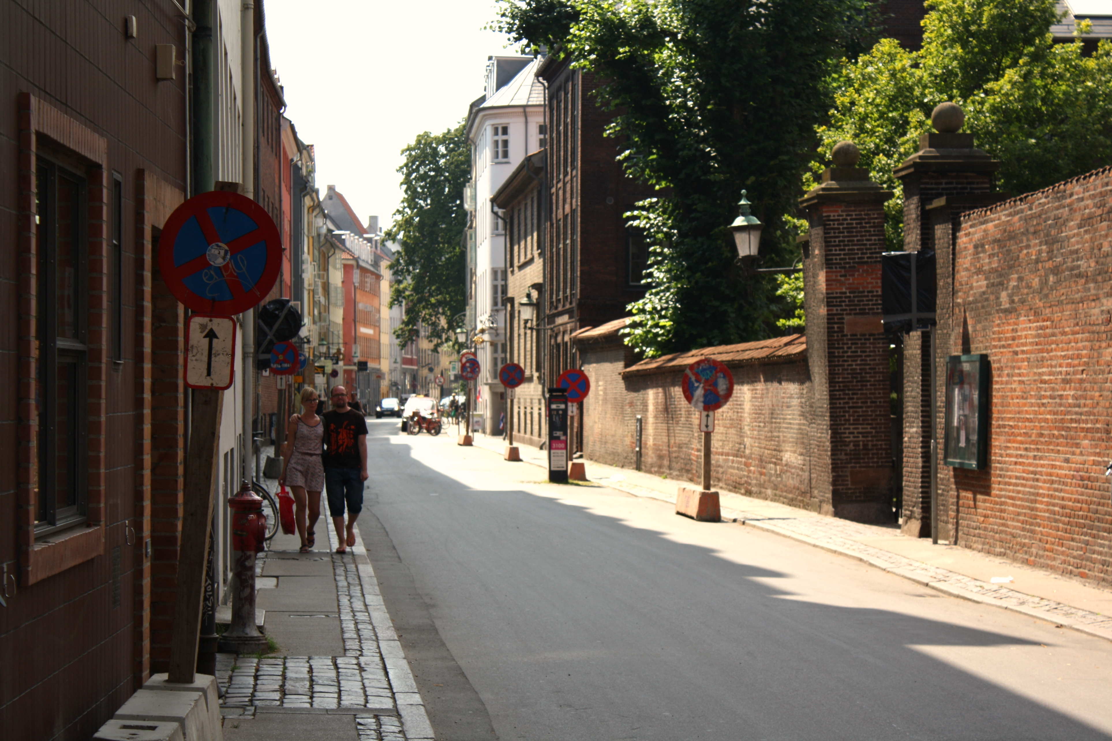 Sankt Peders Stræde in Copenhagen, Denmark